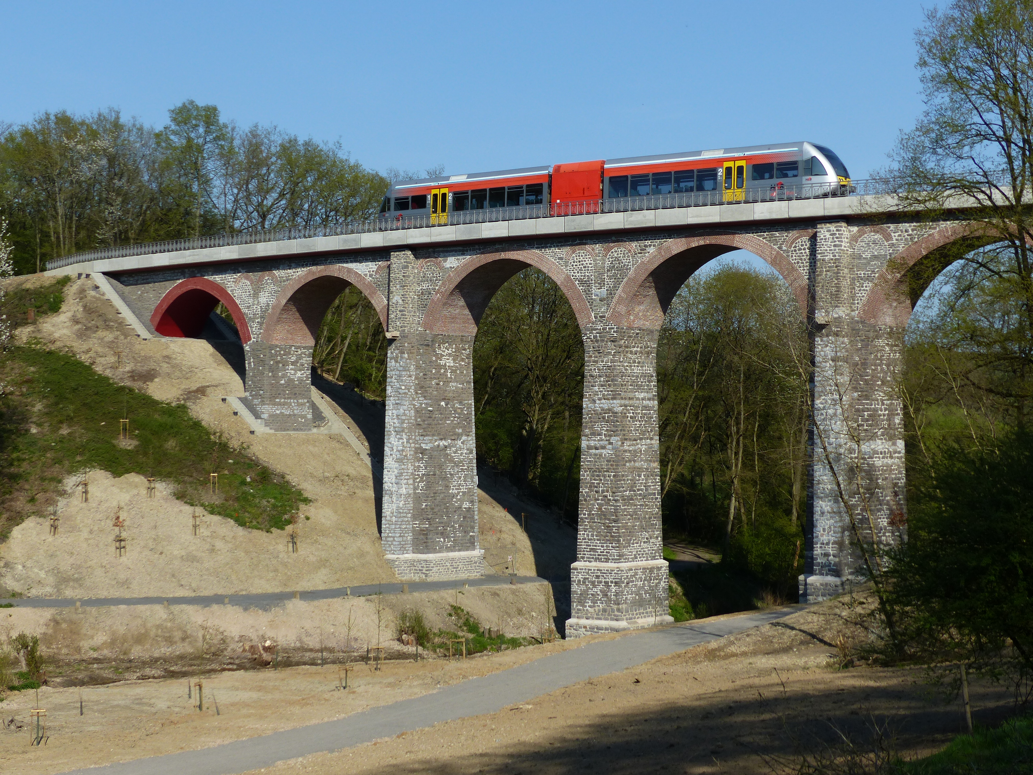 Talbrücke Sandbachtal kurz nach der Renovierung mit Triebwagen Stadler GTW der Hessischen Landesbahn